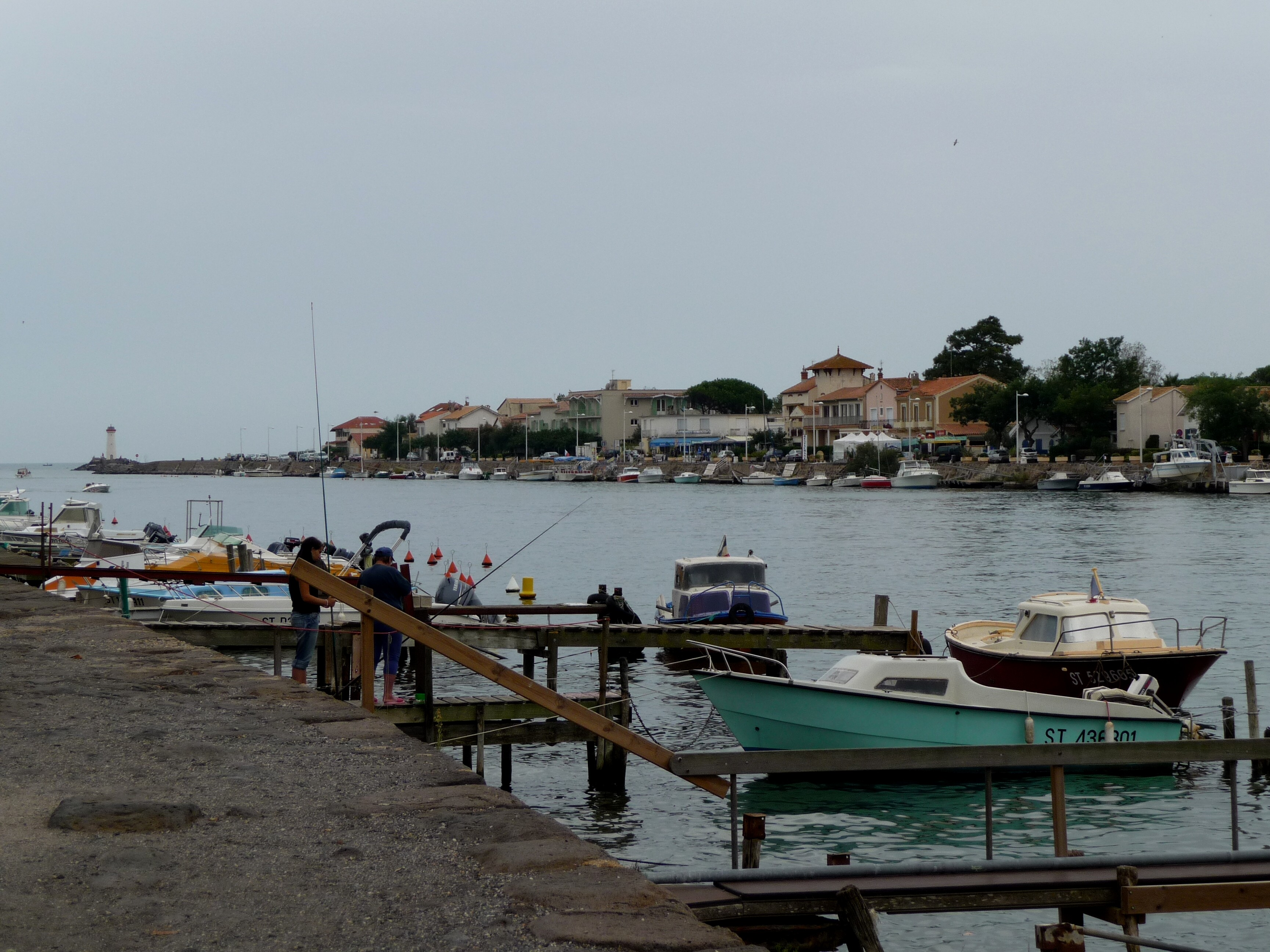 La Tamarissière, commune d'Agde (Hérault, France), vue de la rive opposée de l'Hérault